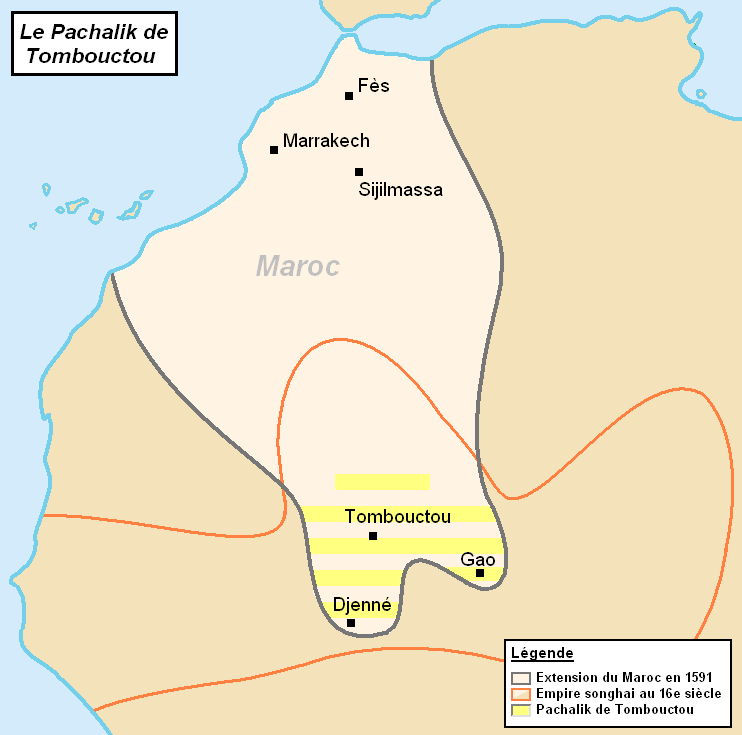 Carte localisant le Pachalik de Tombouctou au sein du Maroc. Sources: "L’Empire songhaï au XVIe siècle", par P. Boiley sur [1] "Trade and empire in Africa, 1500-1800", Times Books 2007 sur [2]